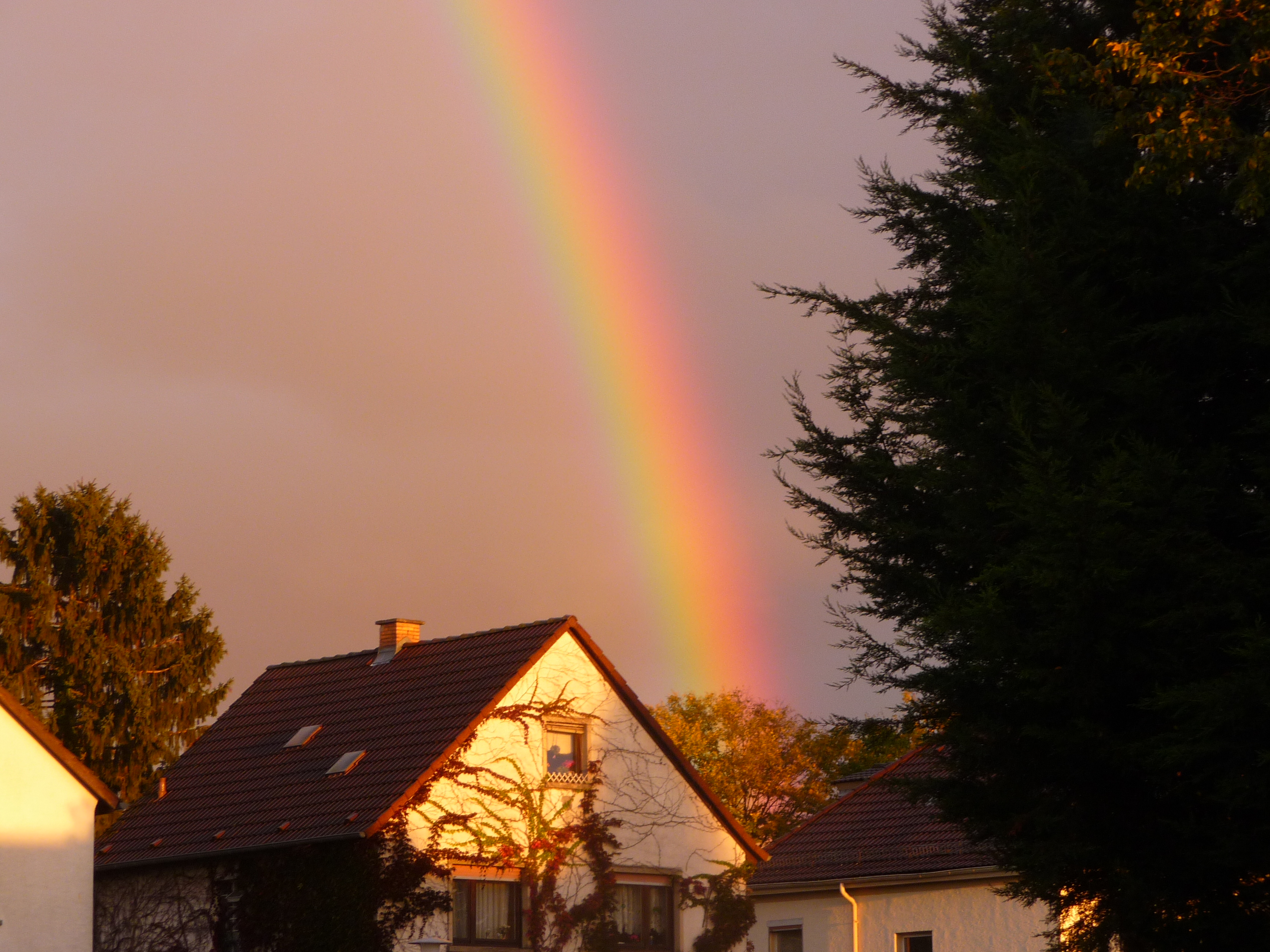 Teil eines Regenbogens im Heidelberger Stadtteil Pfaffengrund